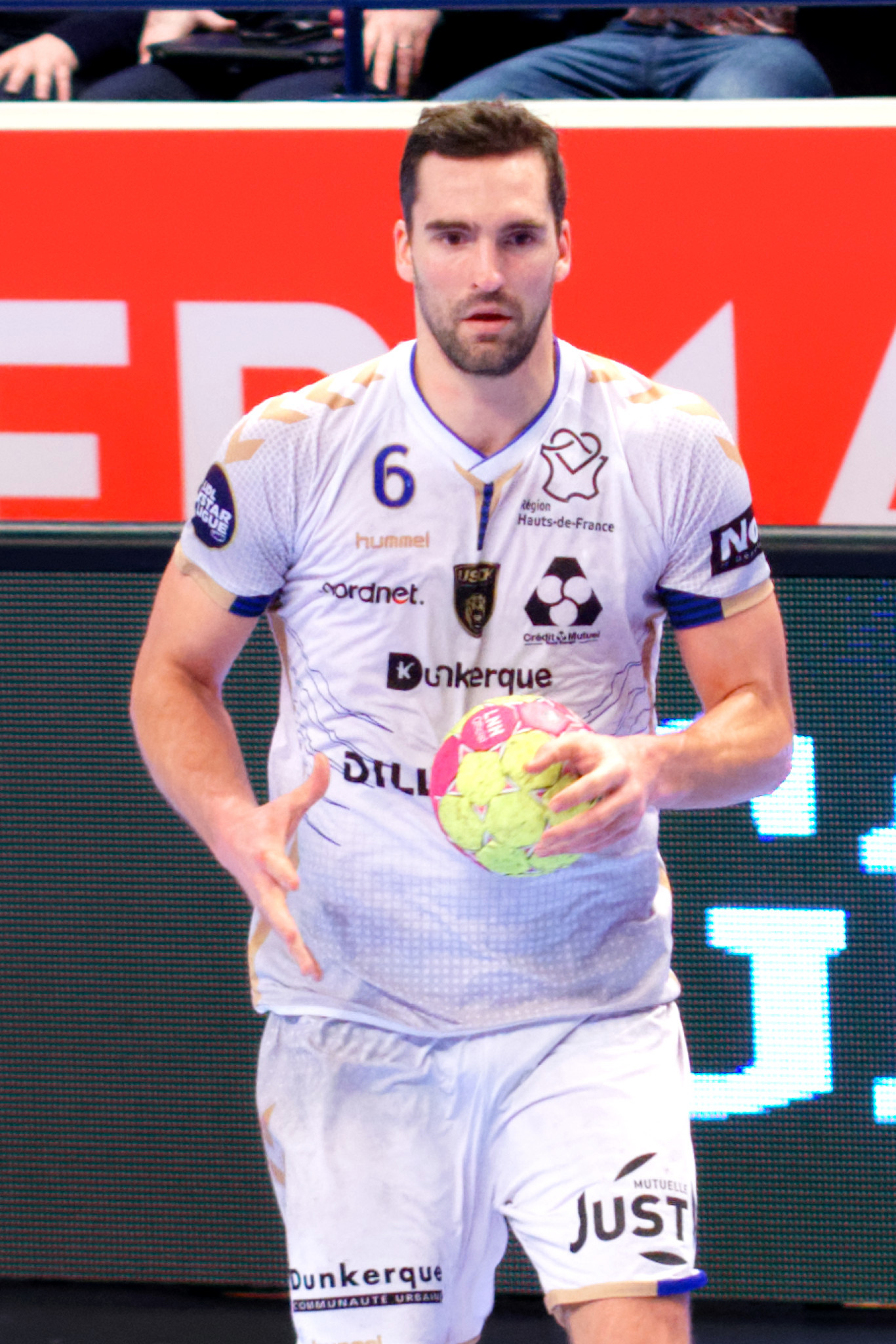 Rencontre de LidlStarligue entre le PSG et l'S Dunkerque. A Coubertin, le 08 mars 2017.